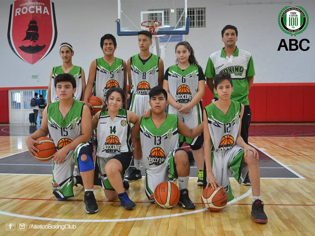 Basquet ABC 2016 - 2019